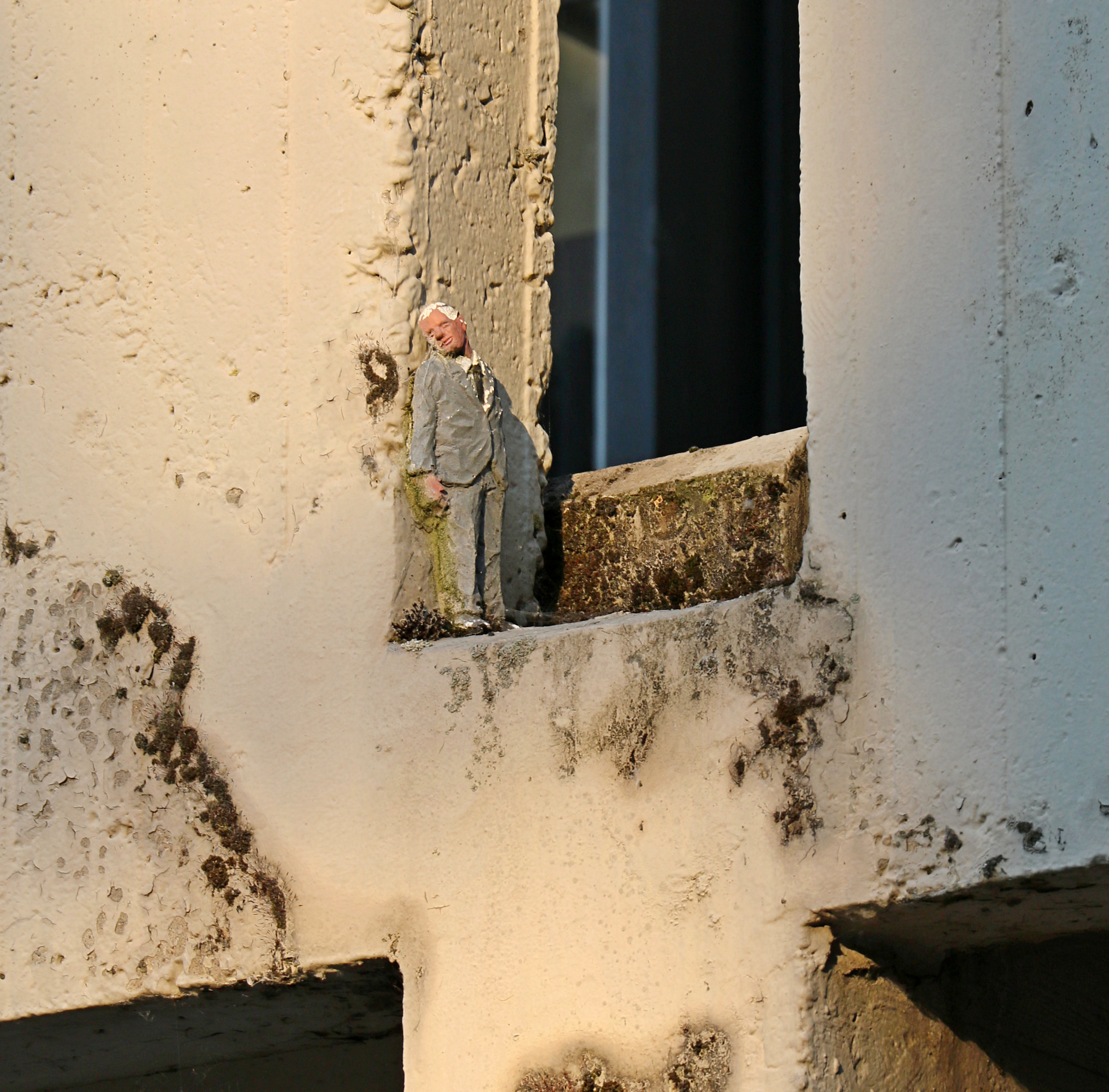 Belgique - Louvain-la-Neuve - statuette d'Isaac Cordal installée lors du Kosmopolite Art Tour 2015